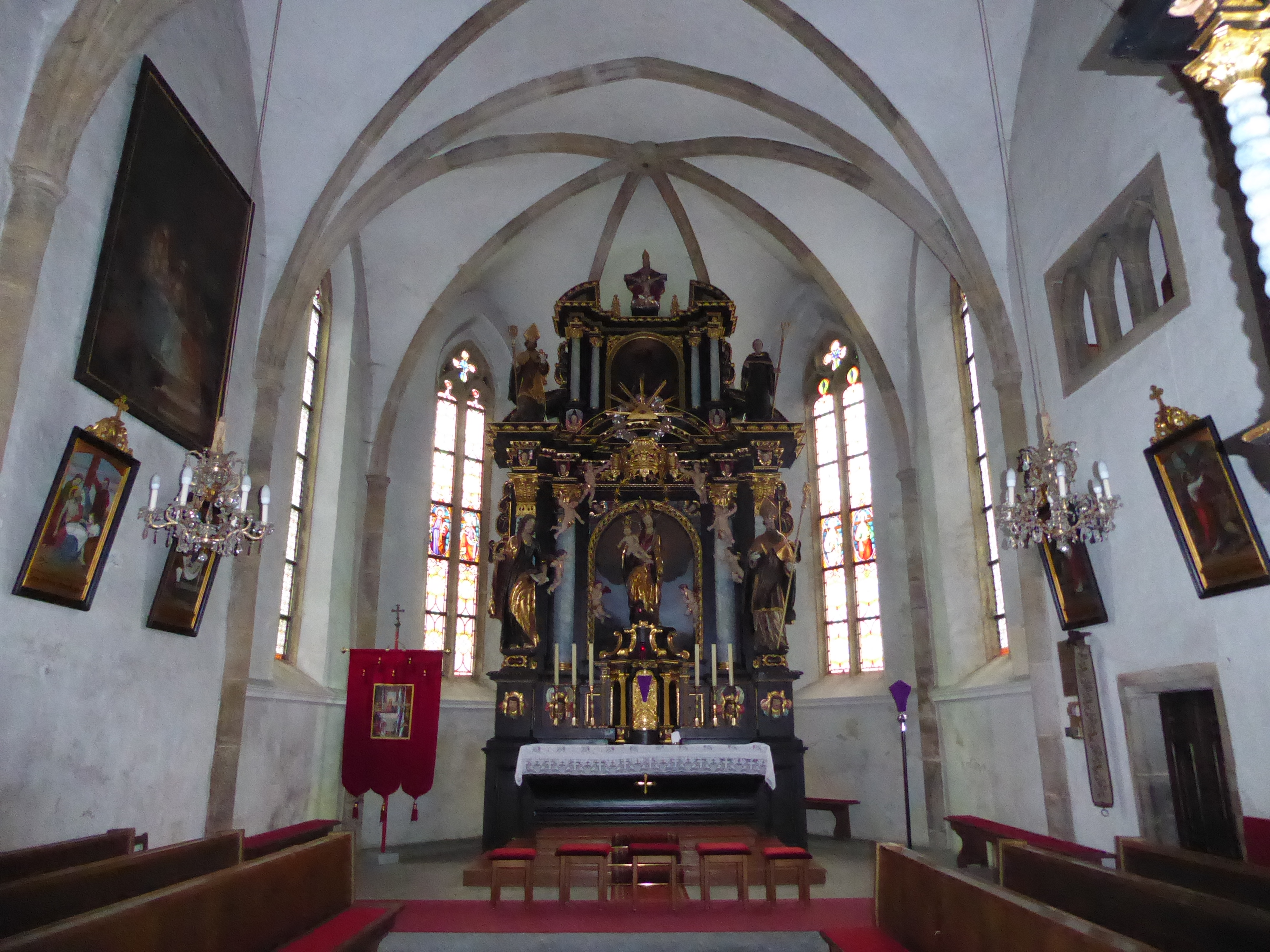 Pfarrkirche, Wallfahrtskirche, Mariä Himmelfahrt (Maria am Grünen Anger), Dimbach, Oberösterreich - Hochaltar